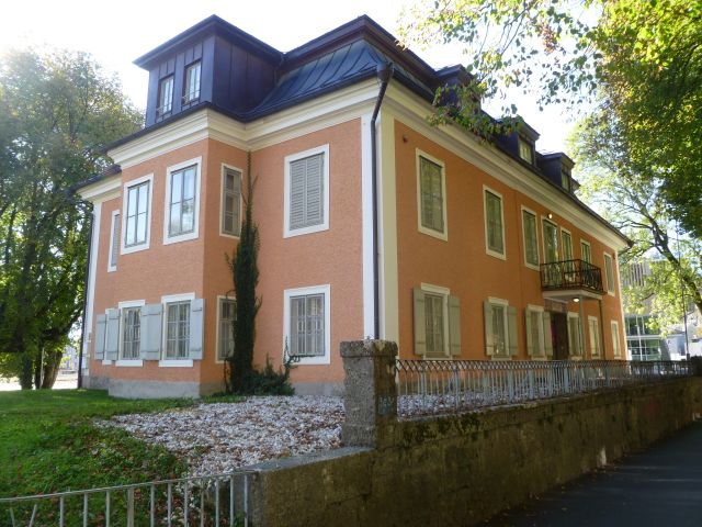 Bertoldsvilla in Salzburg